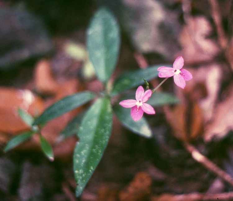 Pseuderanthemum crenulatum, Akanthusgewächse (Acanthaceae) - Kambodscha/Cambodia, Insel Kaoh Ruessei SSE Sihanoukville